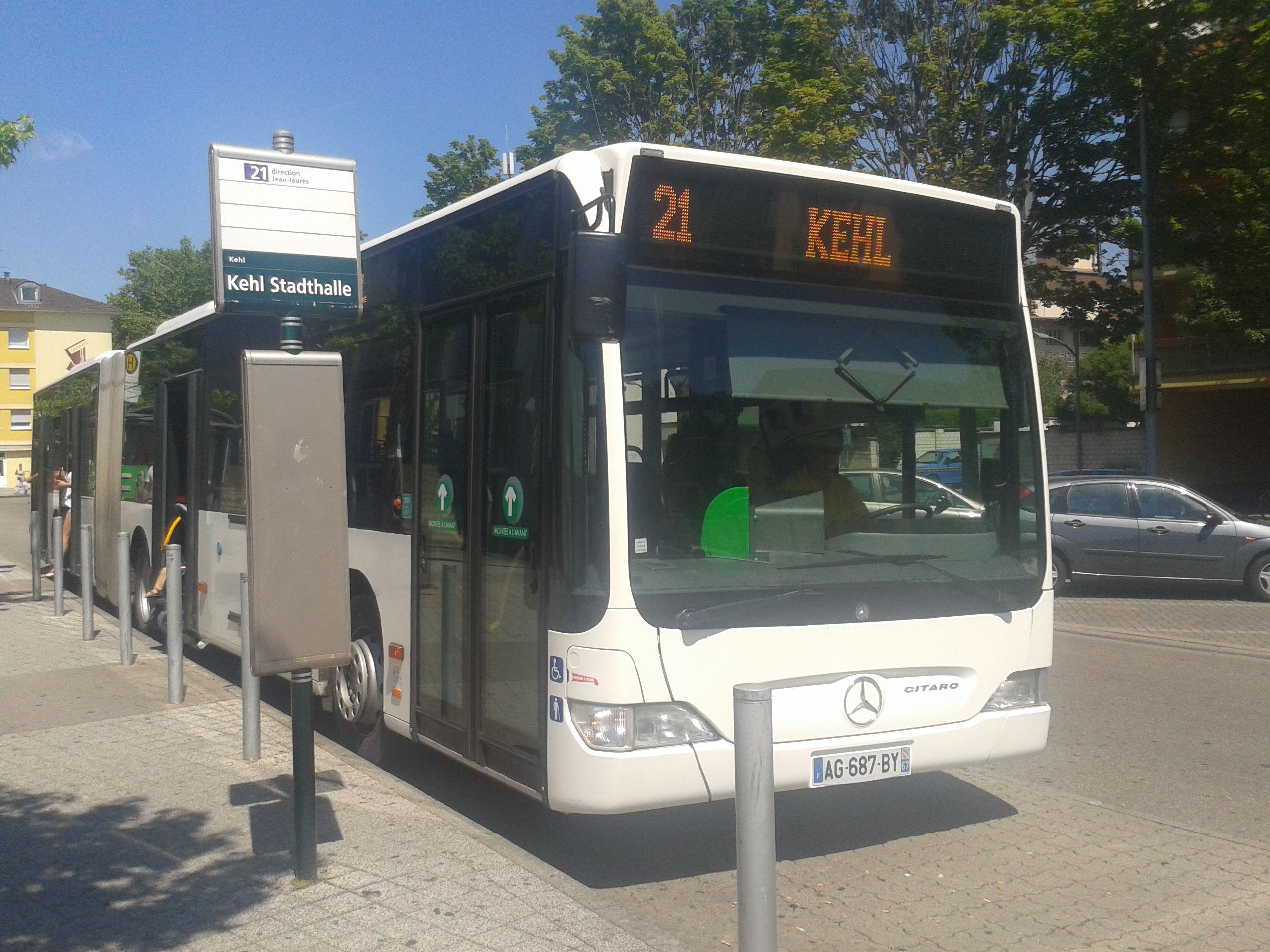 Ein Citaro der Straßburger Verkehrsbetriebe (Compagnie des transports strasbourgeois) hält an der Stadthalle in Kehl und wartet auf die Rückfahrt nach Frankreich.